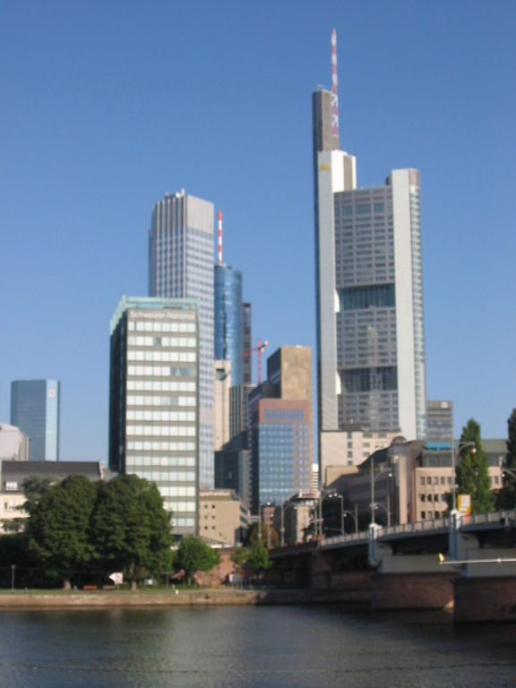 Aperçu du centre d'affaire de Francfort (Allemagne), avec la Commerzbank Tower.